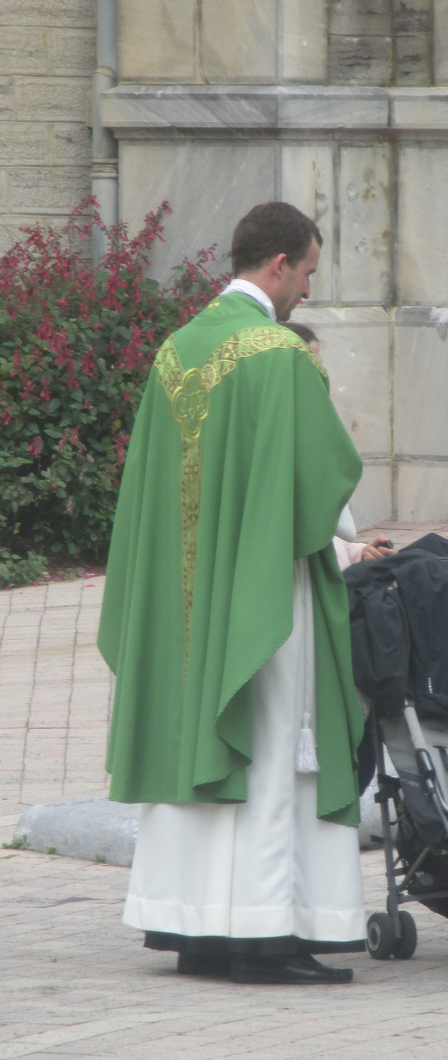 French priest.